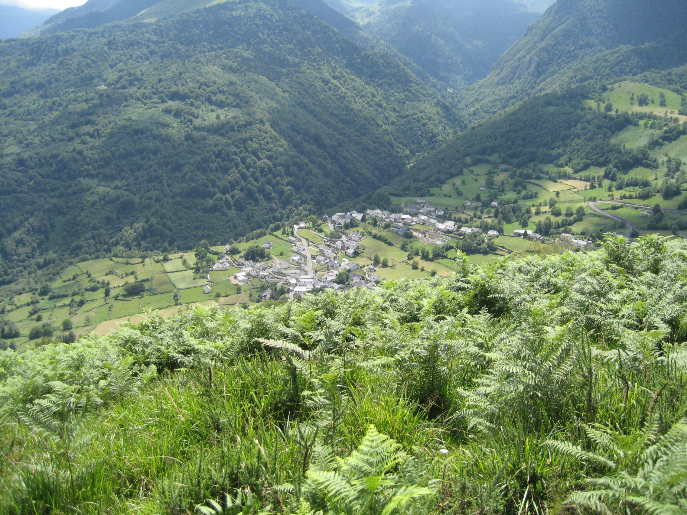 France, Pyrénées-Atlantiques (64), Bilhères